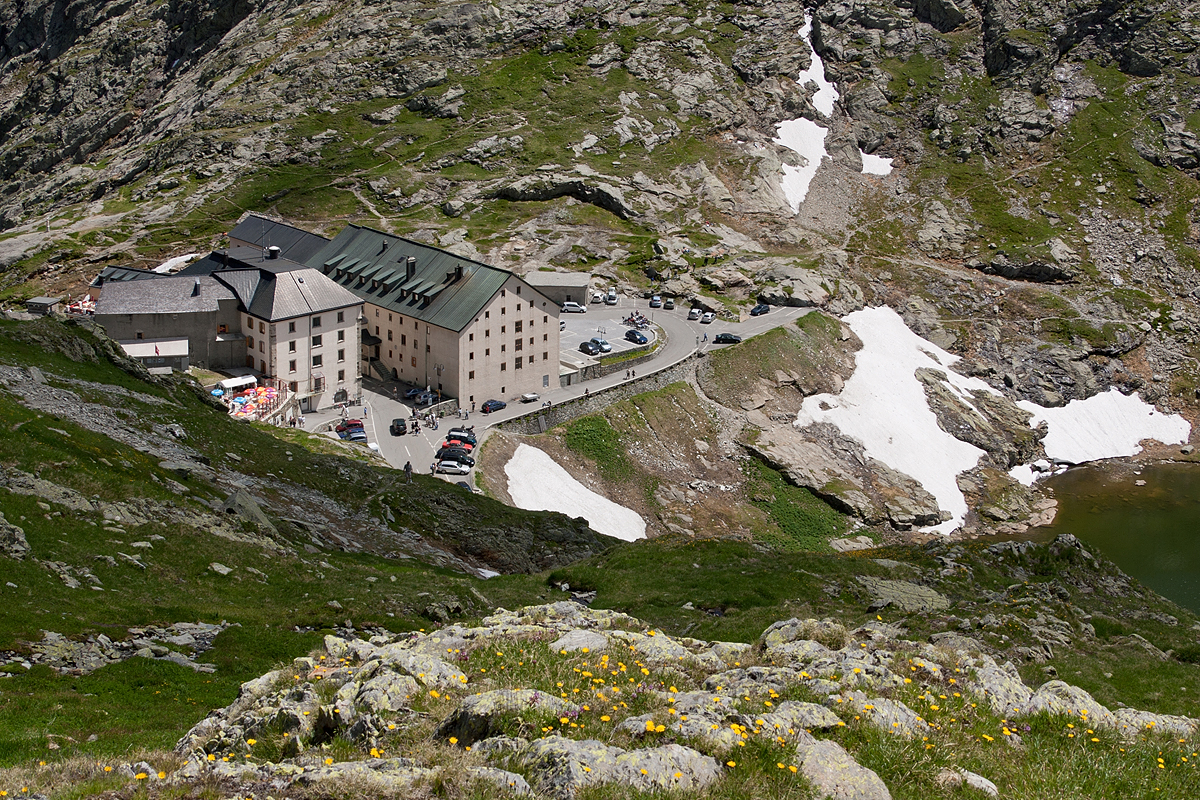 Hospiz auf der Passhöhe vom Grossen Sankt Bernhard